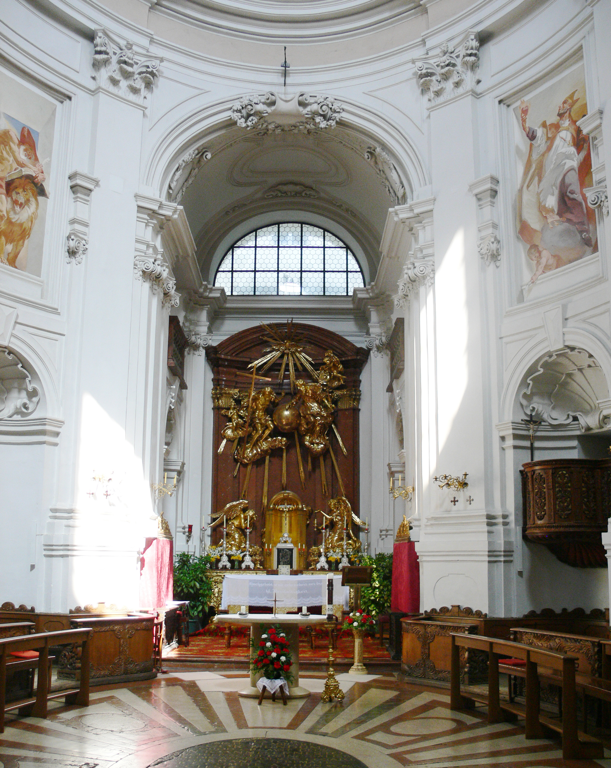 Salzburg, Dreifaltigkeitskirche am Makartplatz Inneres